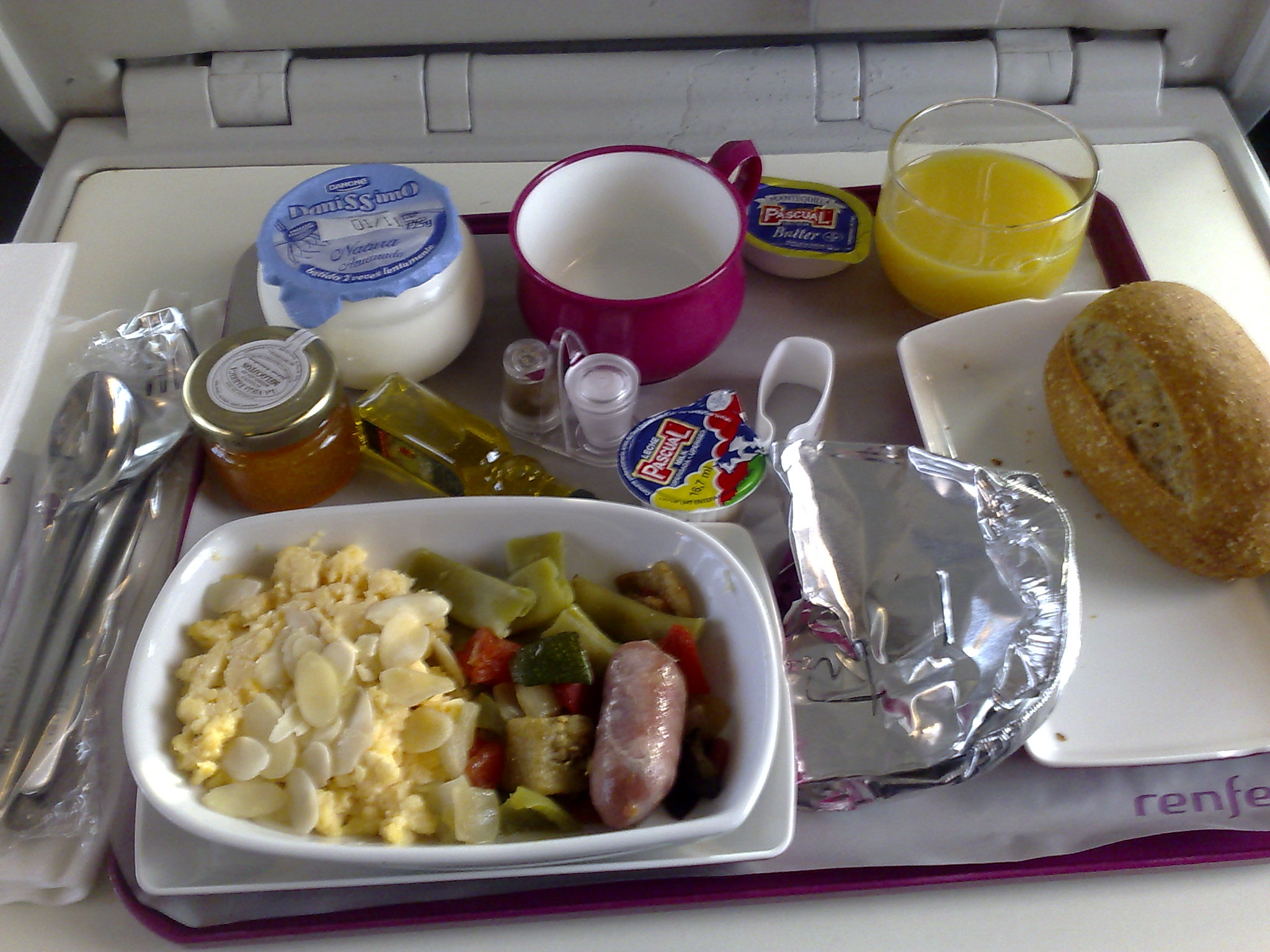 Menú servido en un tren Euromed.